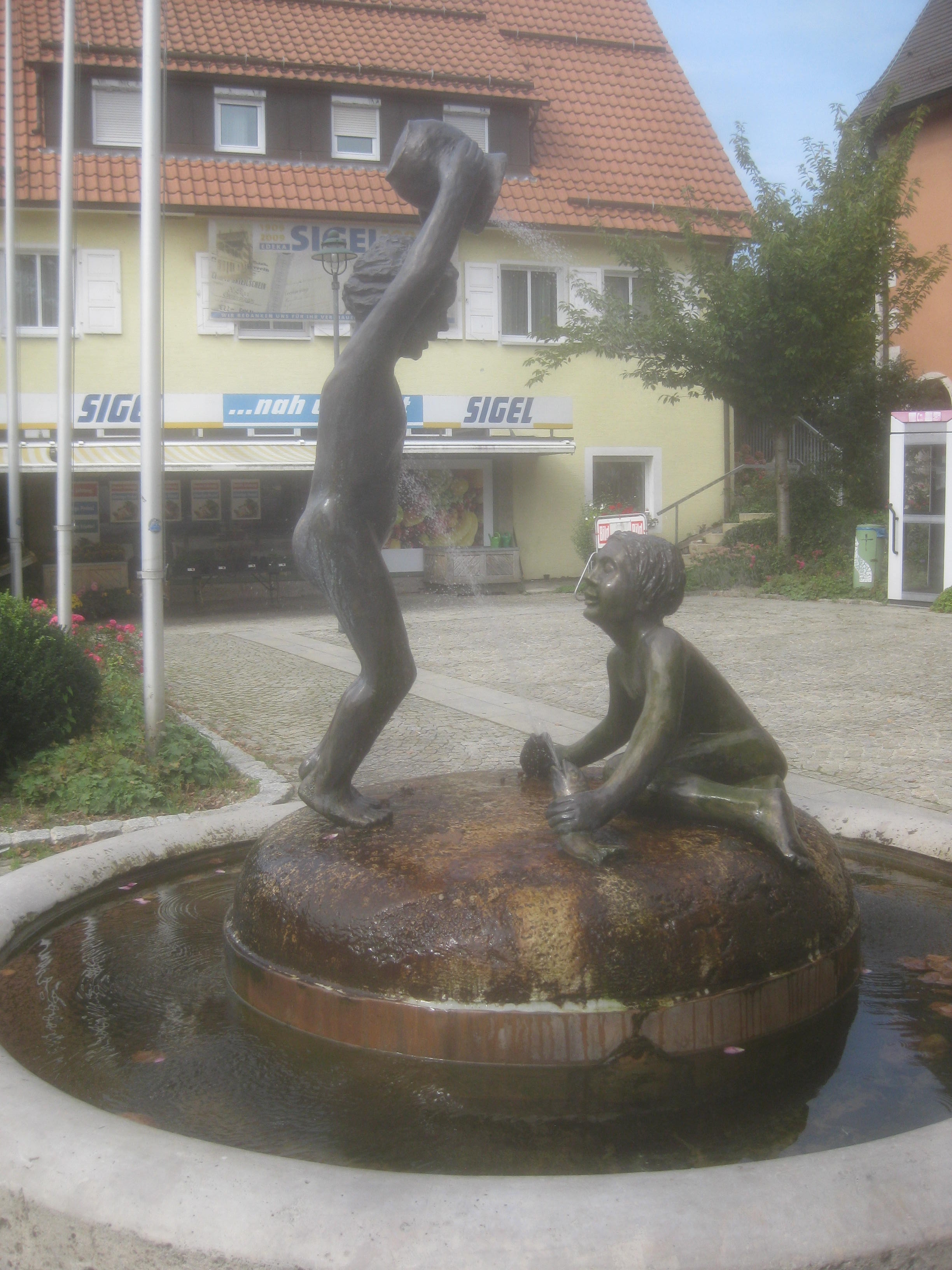 Marktplatzbrunnen von Ulrich Henn am Marktplatz in Oberlenningen. Die beiden Bronzefiguren liefern sich eine heitere Wasserschlacht. Auf einer Muschelkalkkugel steht ein Mächchen, das einen Krug mit Wasser über einen kauernden Jungen ausschüttet, der wiederum zwei Fische auspresst, die das Mädchen vollspritzen.